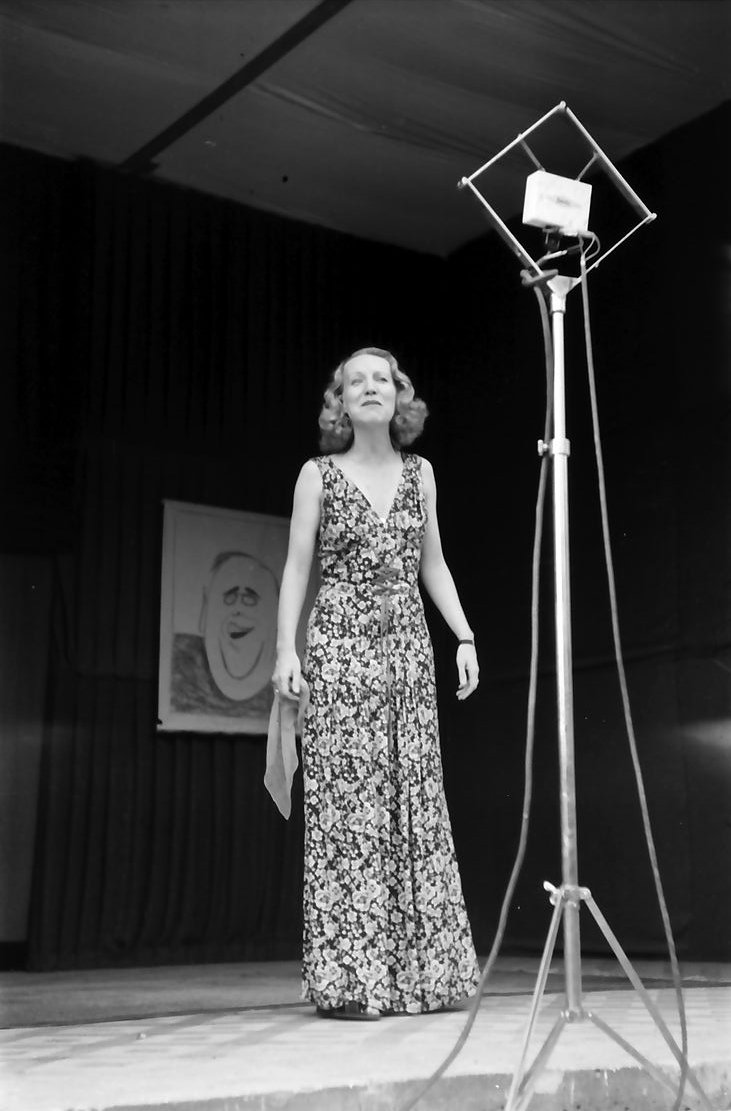 Schloss Güterfelde, Truppenbetreuung: Ilse Abel